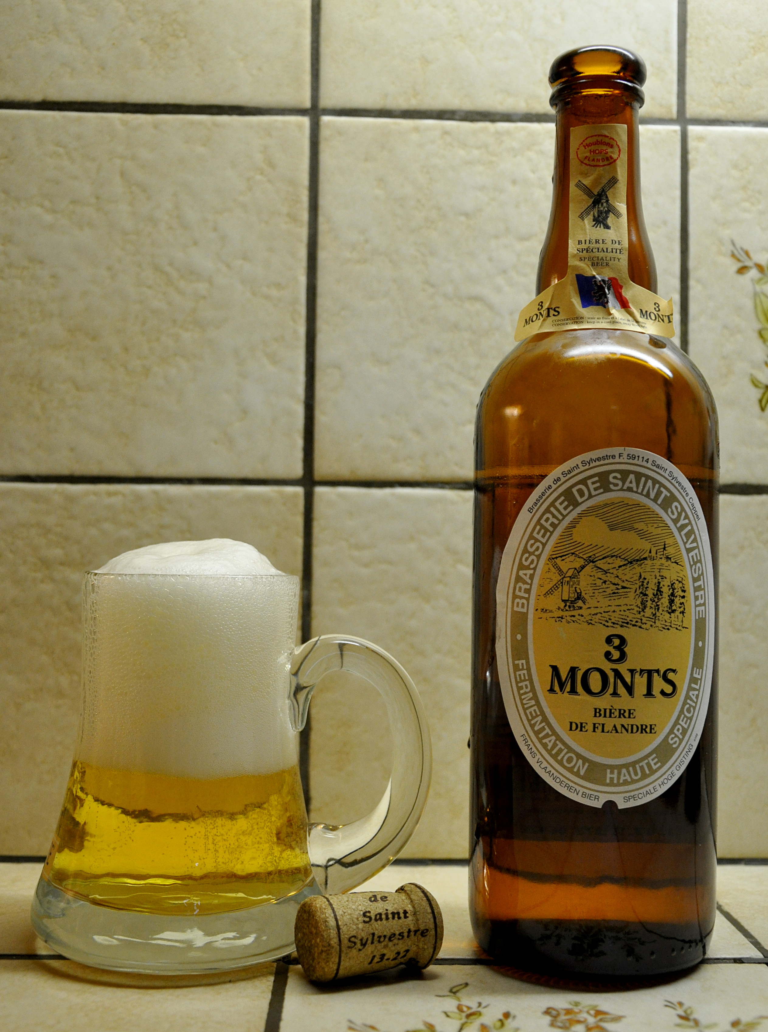 Bouteille de bière 3 Monts débouchée et son verre